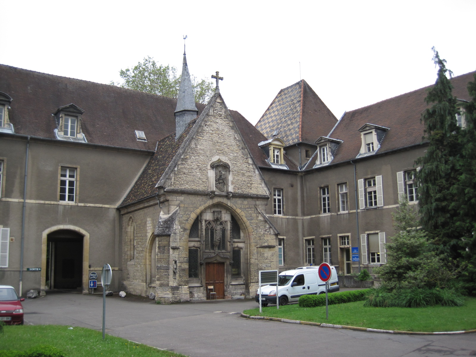 Hospices de Dijon